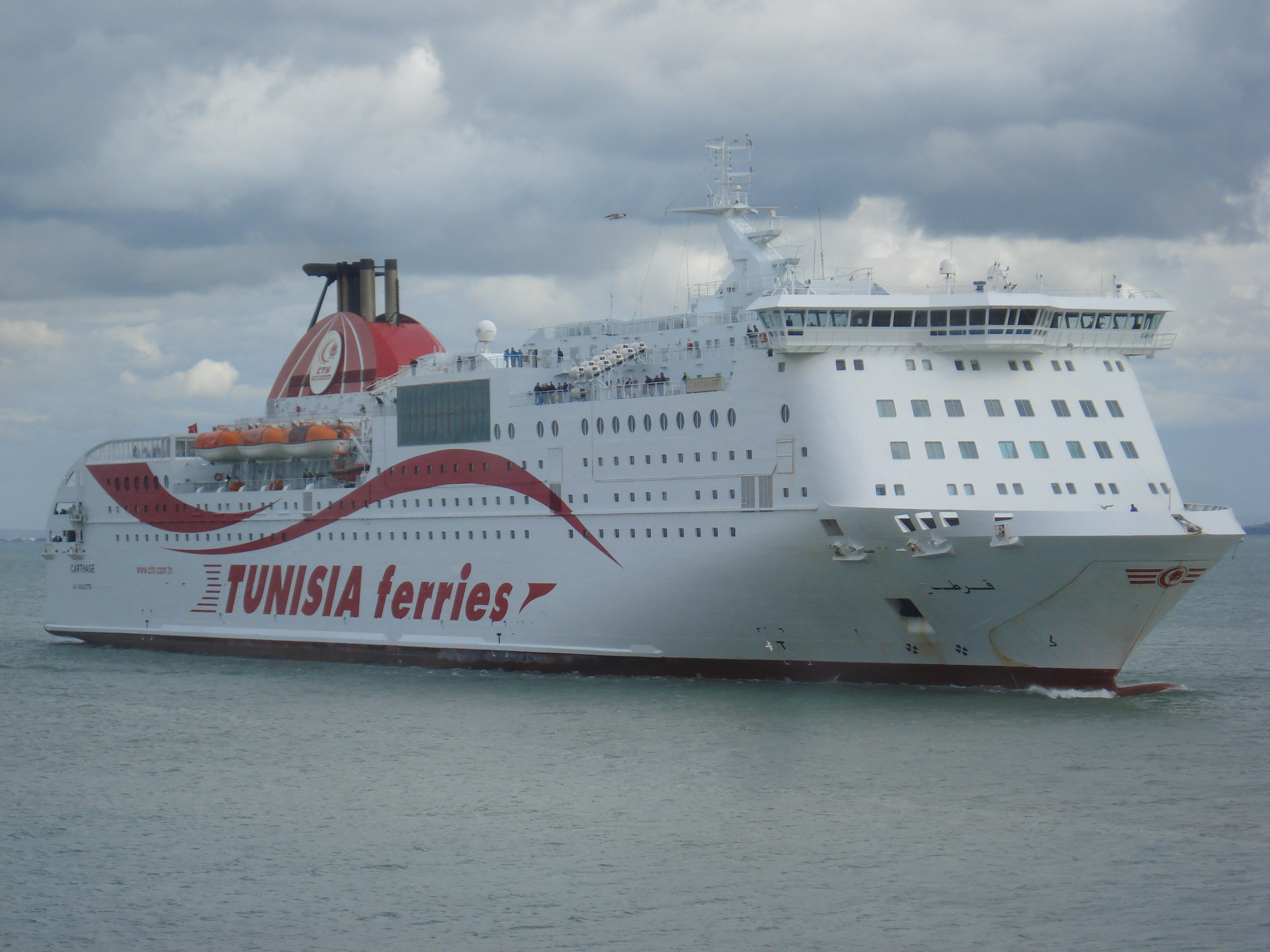 Ferry Carthage (CTN) entrant au Port La Goulette (Tunisie)